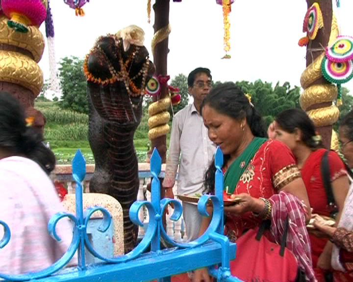 Naag Pooja in Lalitpur District in Nepal.